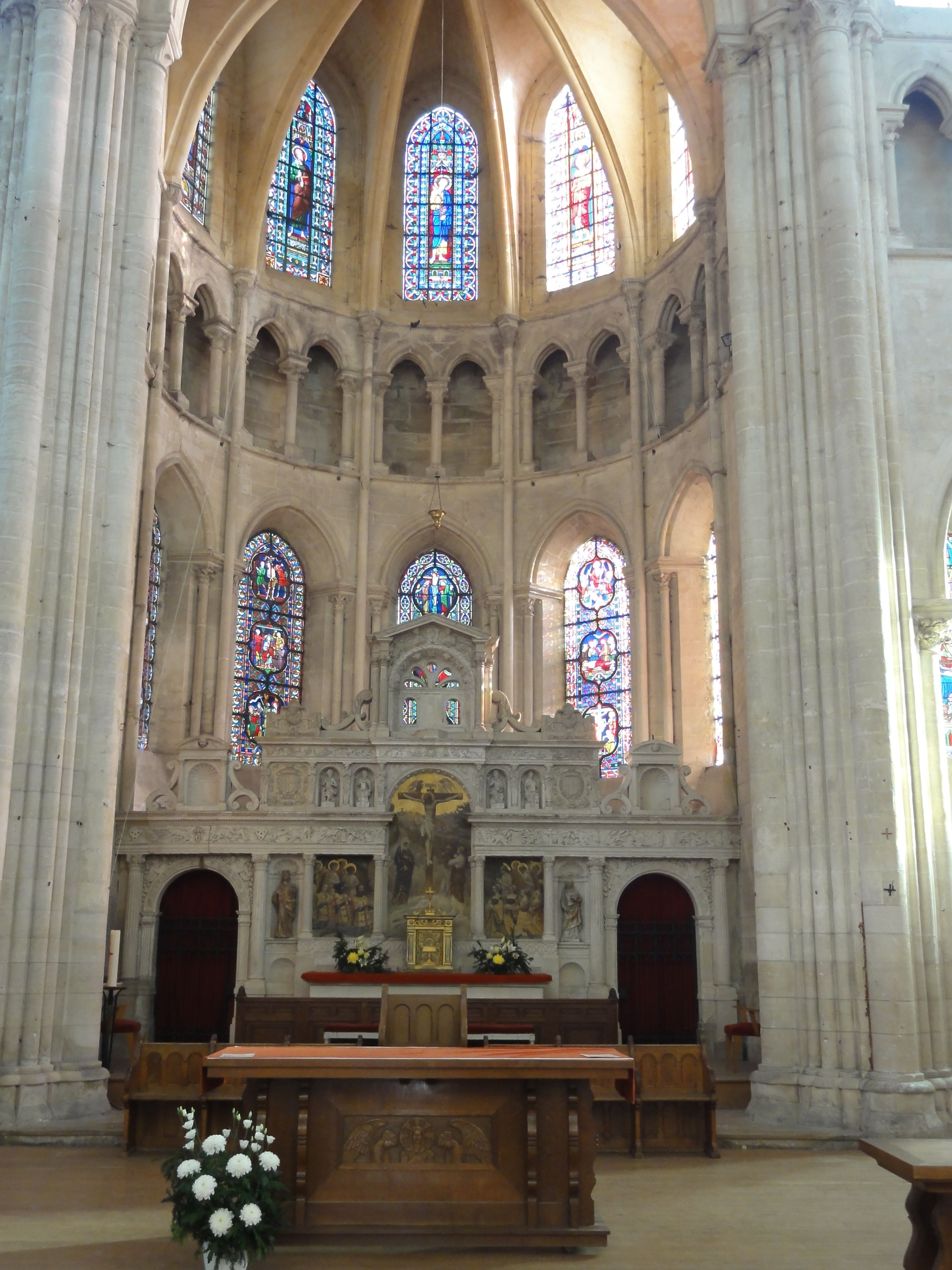 Sanctuaire.